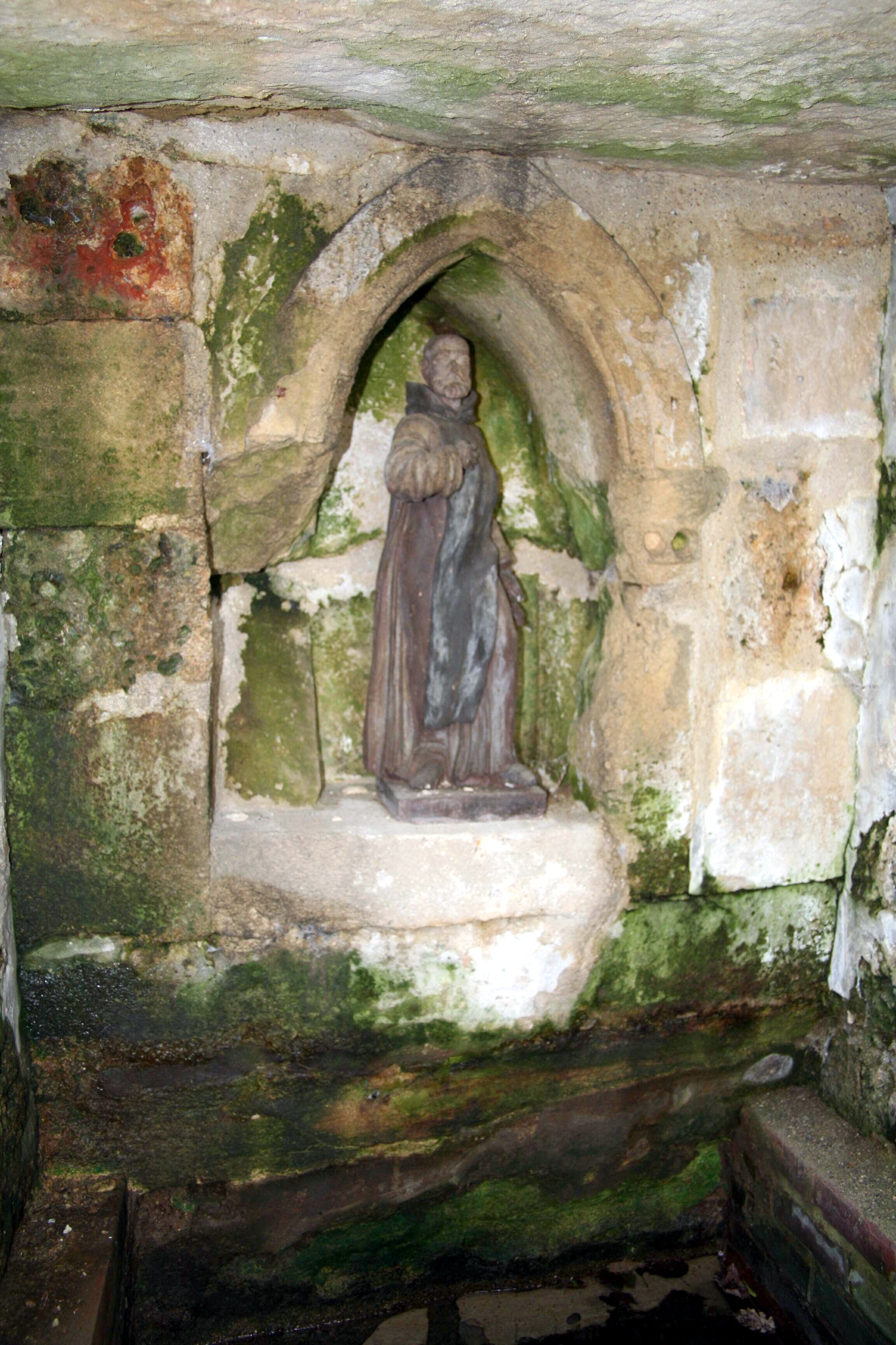 Fontaine Saint-Gaucher à Brueil-en-Vexin - Yvelines (France)